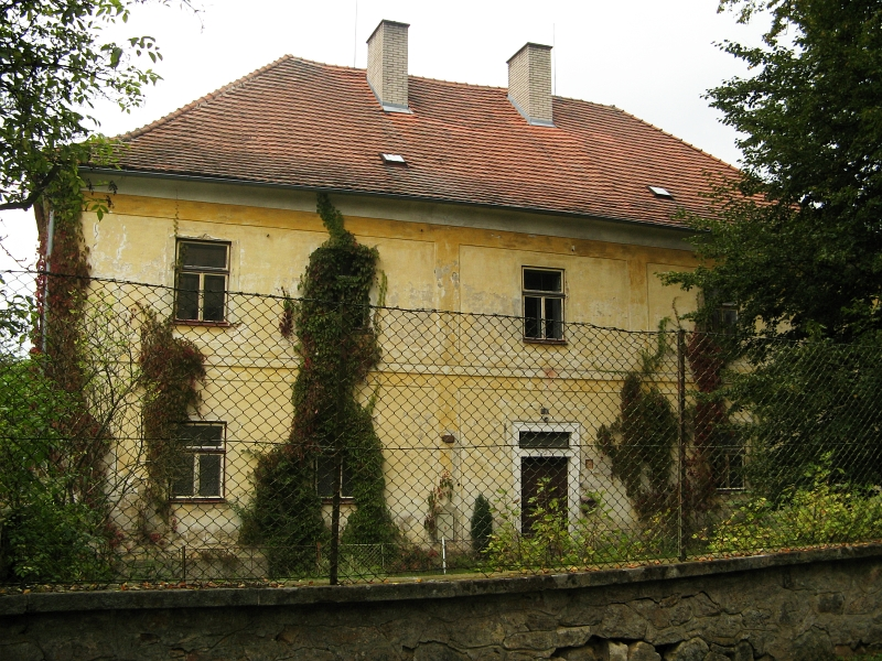 Fara, Ke kostelu 1, Kunžak.